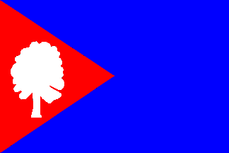 Vlajka obce Bukovany, okres Hodonín. Modrý list s červeným žerďovým klínem s vrcholem ve středu listu. V klínu uťatý bílý buk.